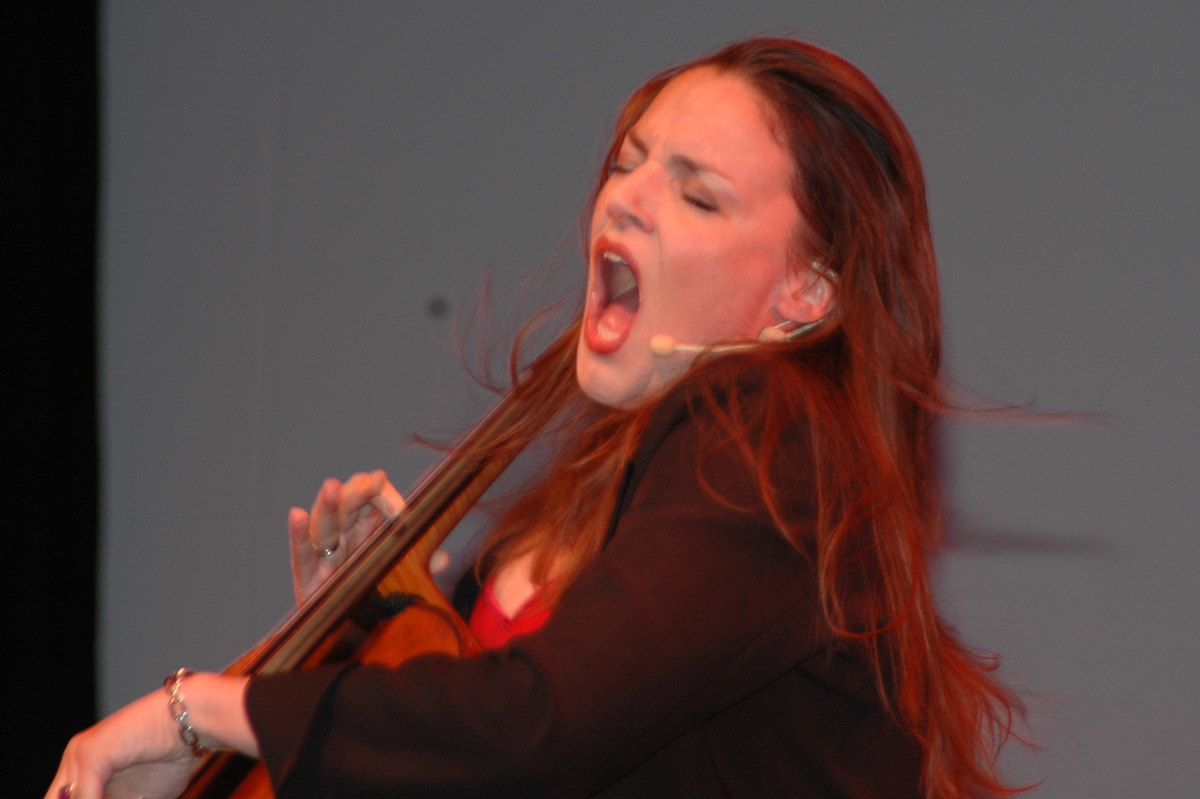 Rebecca Carrington bei einem Auftritt auf der Freiburger Kulturbörse 2009